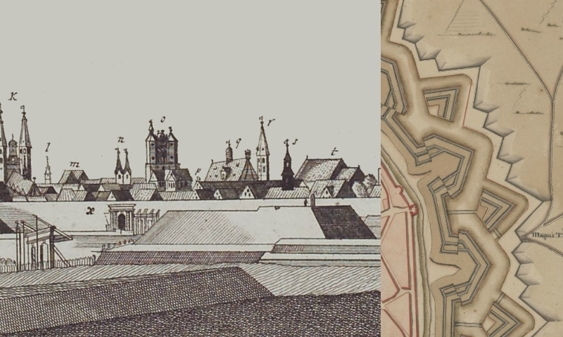 Ansicht von Osten und Plan der barocken Stadtbefestigung Braunschweigs im 18. Jahrhundert. Ansicht von Anton August Beck (1713–1787), Plan von Johann Georg Maximilian von Fürstenhoff (1686–1753).